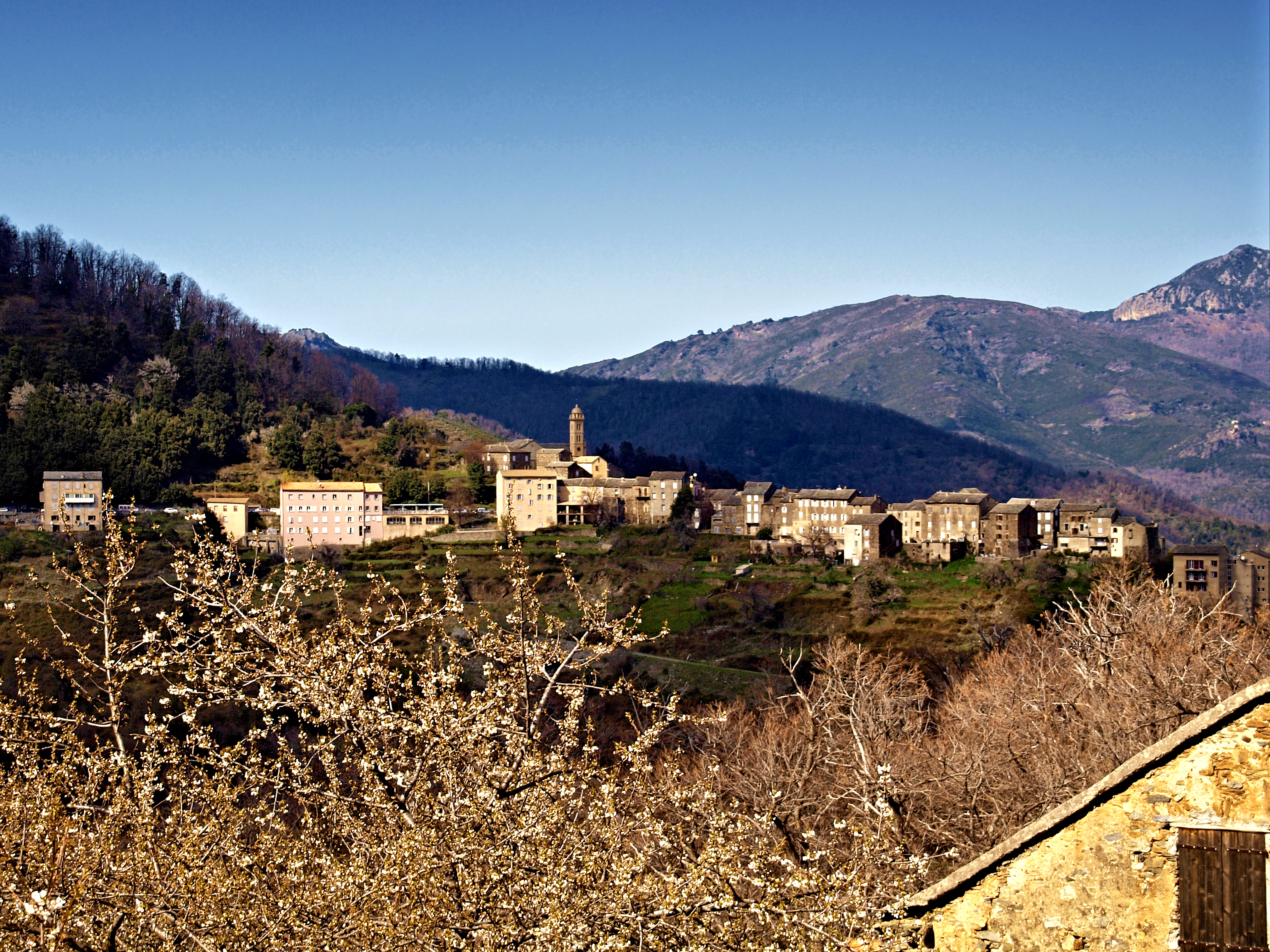 Piedicroce (Corsica) - Vue du village depuis Carchetto